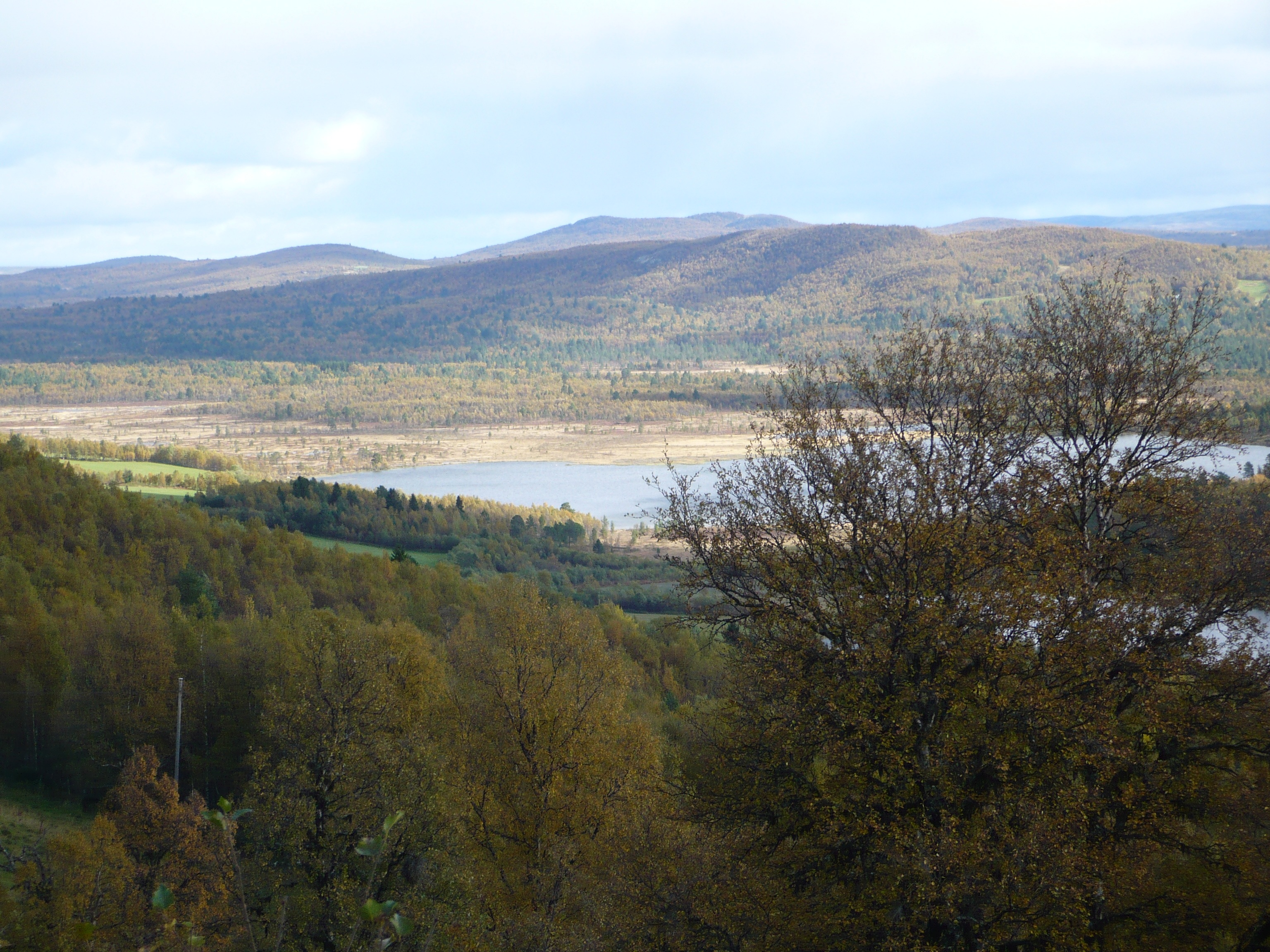 Øvre Tallsjø, Olafloen